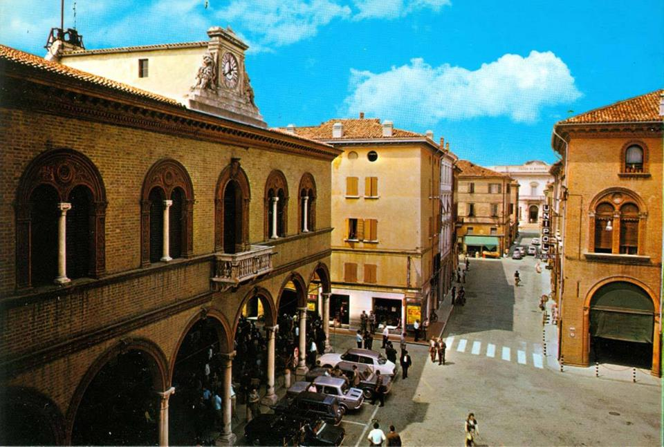 Il Municipio di Mirandola (sinistra), palazzo Bergomi (a destra) e via Felice Cavalloti con lo sfondo del palazzo della Cassa di Risparmio di Mirandola (1970)